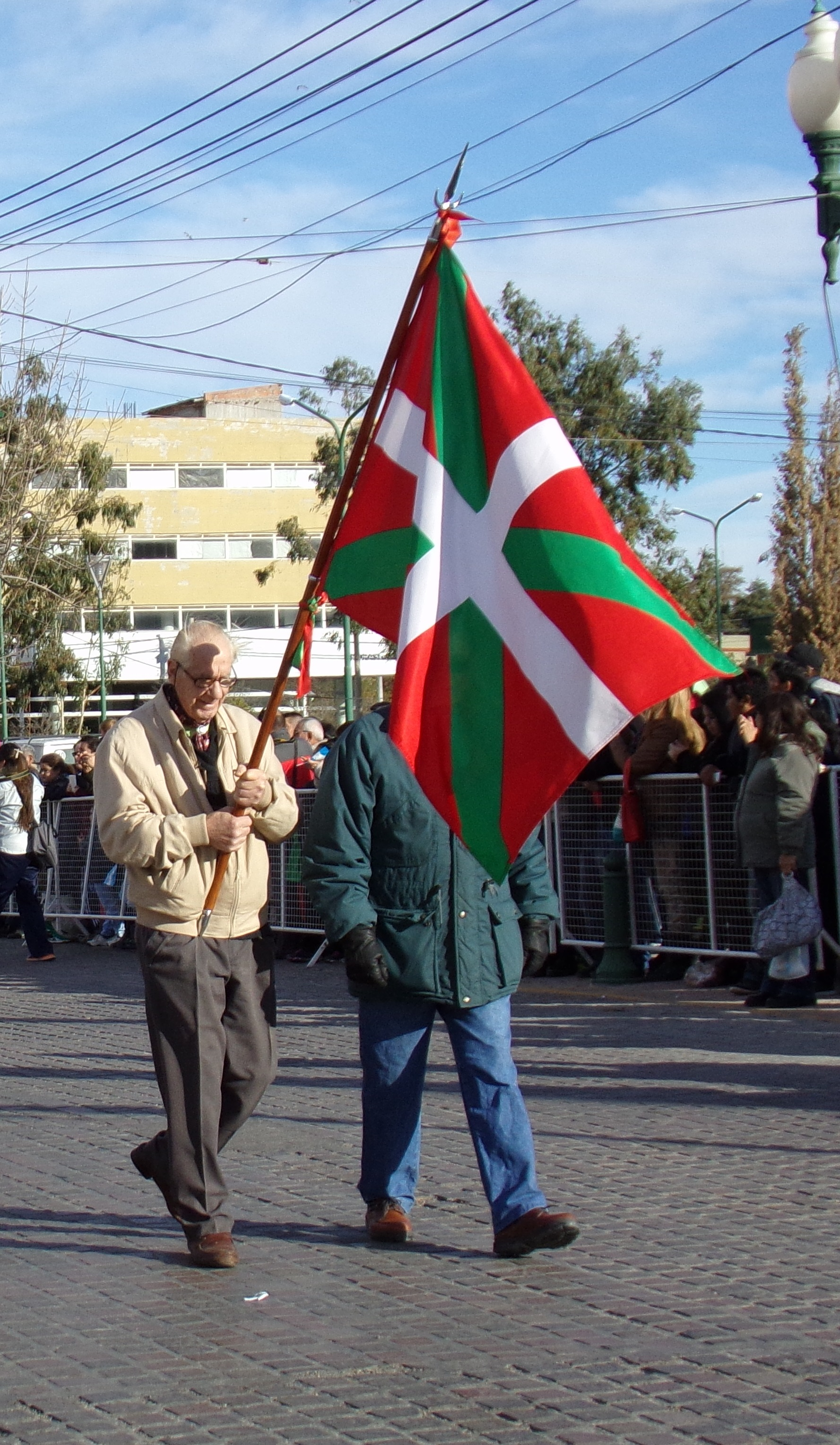 Colectividad vasca de Trelew, Argentina, durante el desfile del 25 de mayo de 2015